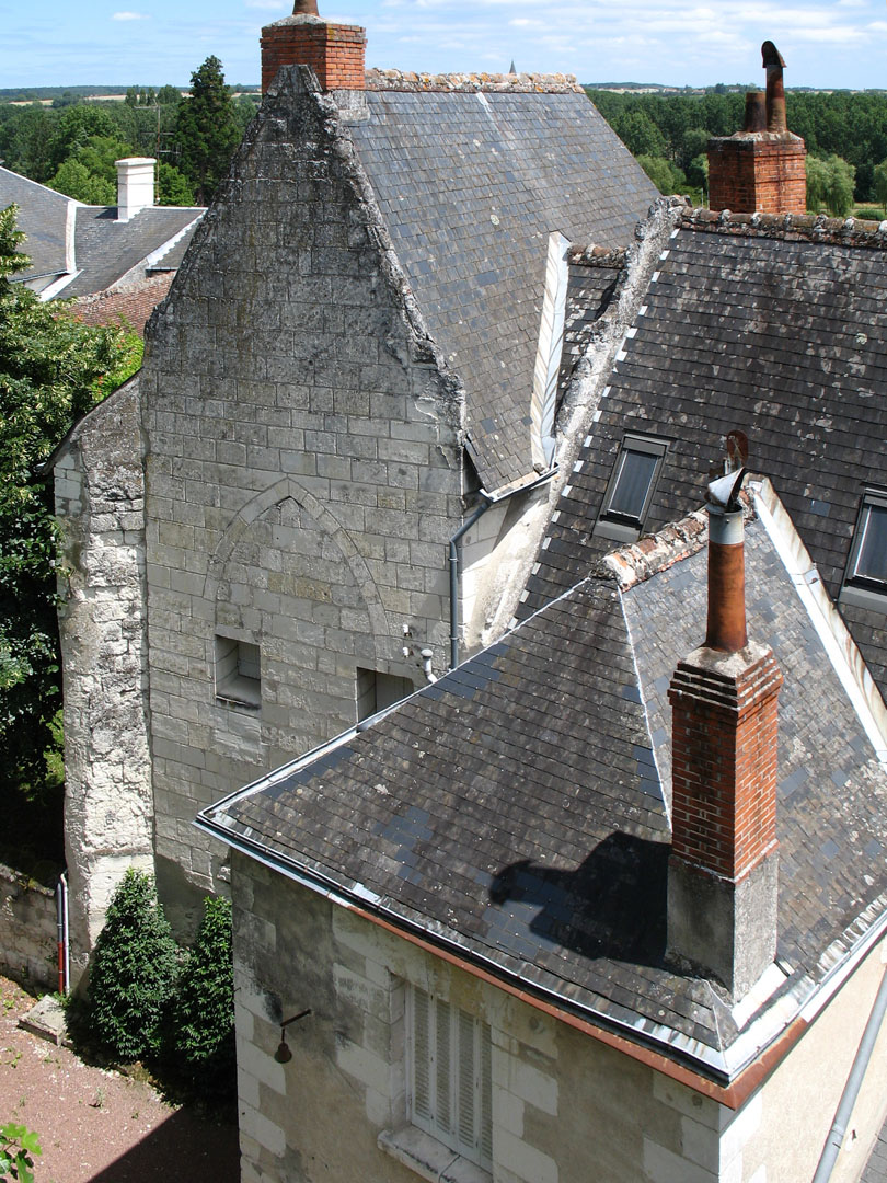 Toit en ardoise, Loches, France